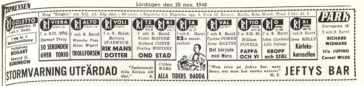 Biografannons för Ri-Teatrarnas biografer i Stockholm lördagen den 20 november 1948 i Expressen